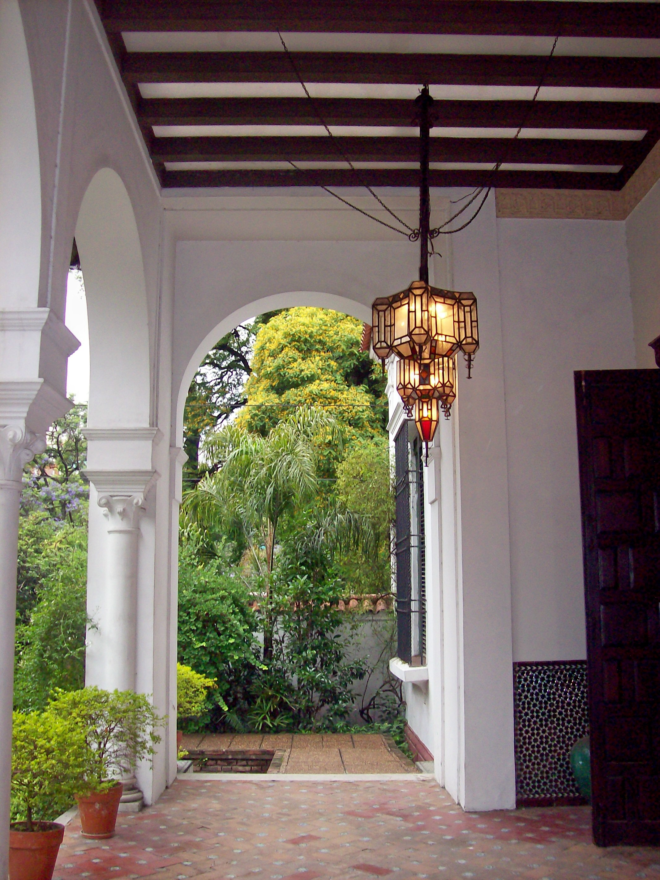 Museo de Arte Español Enrique Larreta, en Avenida Juramento, barrio de Belgrano, Buenos Aires, Argentina: galería que da al Jardín andaluz.